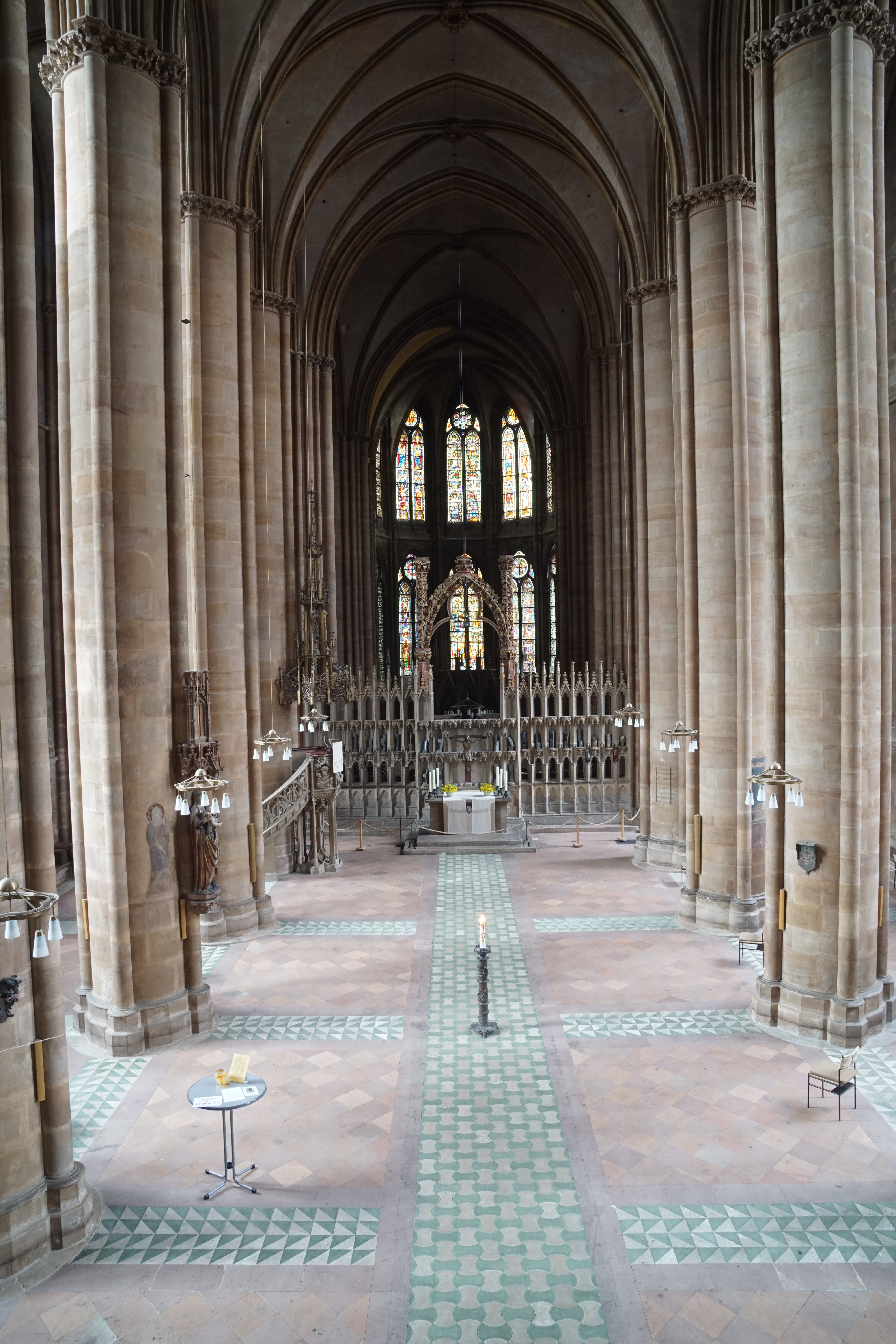 Siehe Dateiname